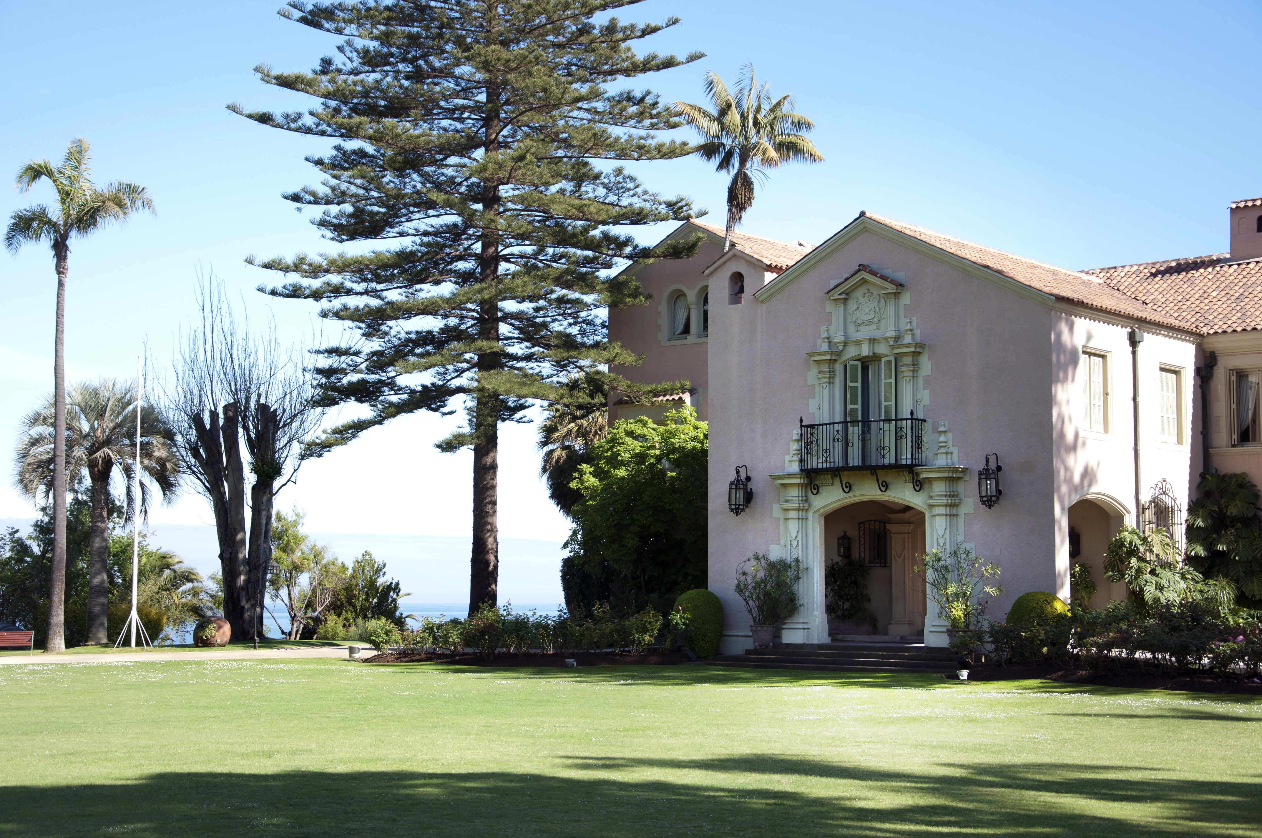 Palacio Presidencial de Cerro Castillo This is a photo of a national monument in Chile: 1009